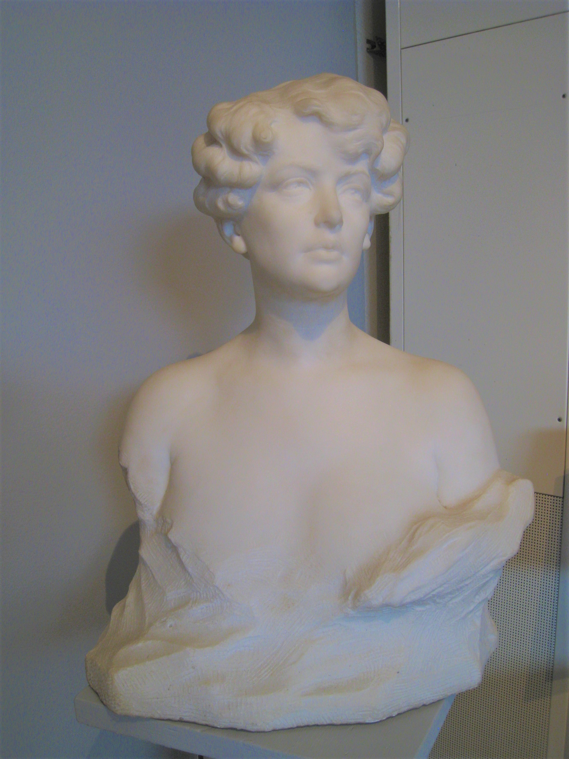 Friherrinnan Märtha Cederström (1873-1925), porträttbyst utförd av skulptören Alice Nordin (1871-1948), 1910. Skulpturen signerad och daterad Alice Nordin 1910, utförd i carraramarmor, höjd 68 cm. Märta Cederström, gift i sitt första gifte med hovmarskalk friherre Louis de Geer af Leufsta (1866-1925), Frötuna gård, Uppland. Hon var gift i sitt andra gifte med generalen Ernst Linder (1868-1943).